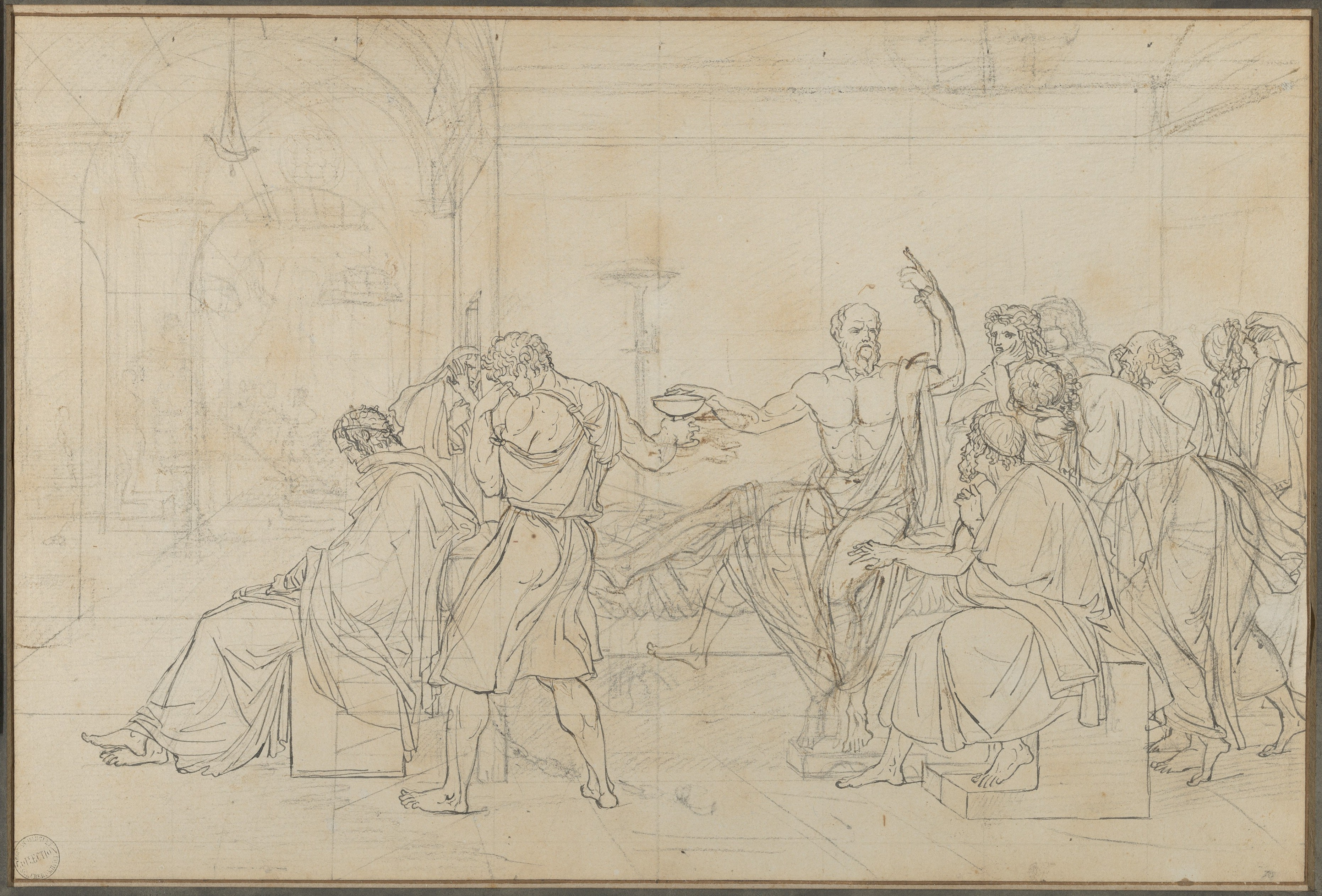 Drawing; Drawings